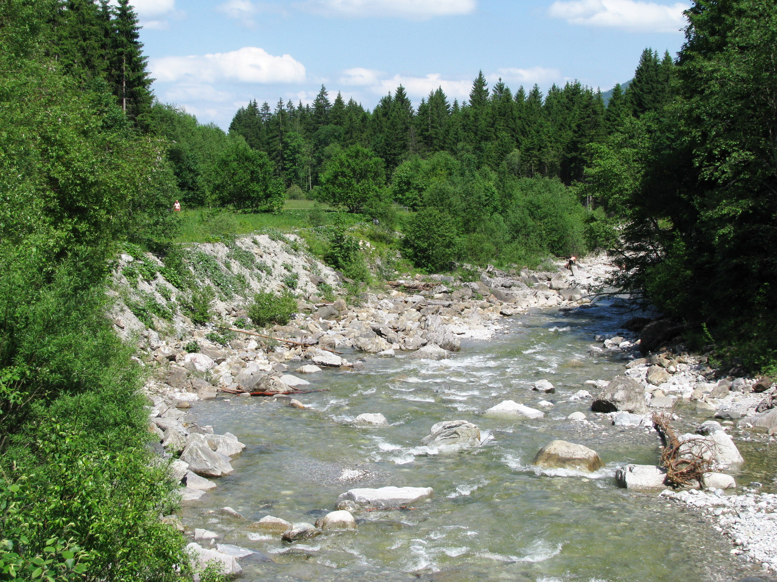 Halbammer an der Brücke bei Unternogg, flussabwärts gesehen.